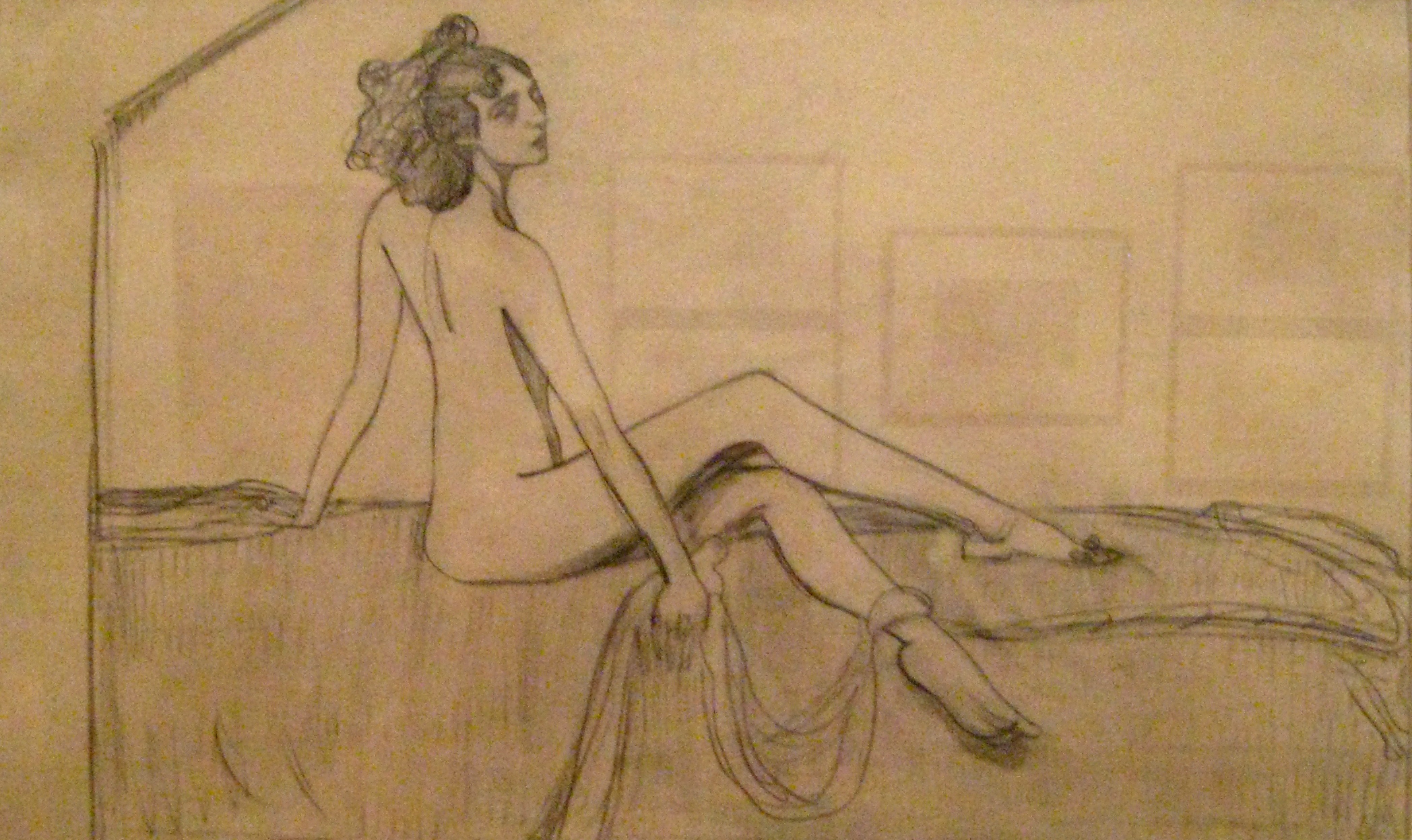 Ида Рубинштейн. Рисунок. ГТГ, 1910